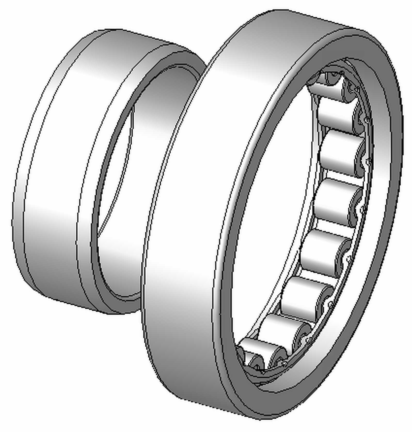 Zylinderrollenlager, Innenring ohne Borde, Aussenring mit zwei Borden, Blechkäfig aus Stahl, zerlegbar, Explosionsdarstellung, Hinweis: Innenaufbau des Lagers (insbesondere des Kaefigs) variiert je nach Hersteller und Baugroesse rolling contact bearings